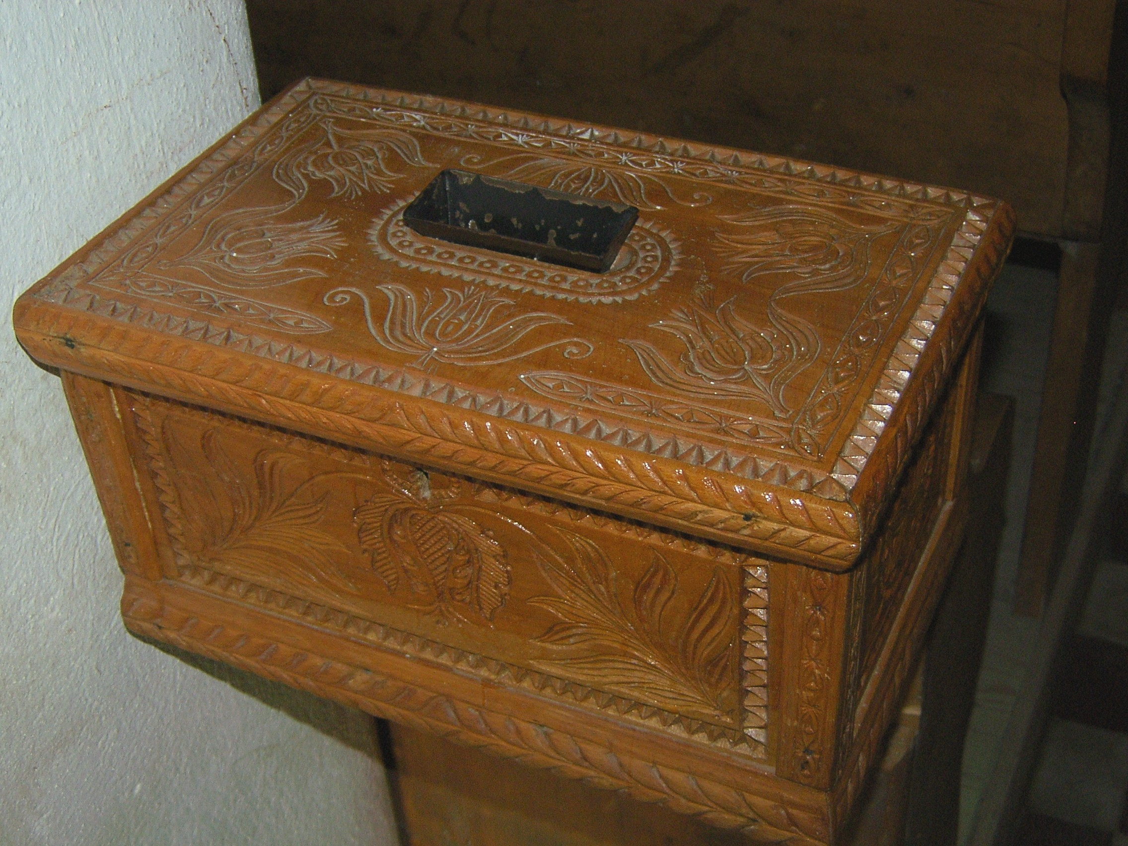 A Magyargyerőmonostori templom perselye